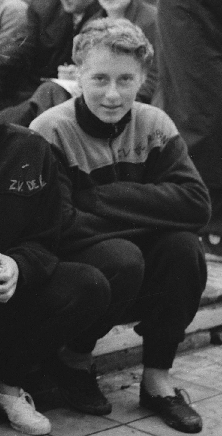 Collectie / Archief : Fotocollectie Anefo Reportage / Serie : [ onbekend ] Beschrijving : Nationale zwemkampioenschappen Amsterdam, start 100 mete rugslag dames. G. Kraan Datum : 2 september 1956 Locatie : Amsterdam, Noord-Holland Trefwoorden : zwemkampioenschappen Persoonsnaam : A. Voorbij, G. Kraan, Nijs, L. de, R. Krom Fotograaf : Behrens, Herbert / Anefo Auteursrechthebbende : Nationaal Archief Materiaalsoort : Negatief (zwart/wit) Nummer archiefinventaris : bekijk toegang 2.24.01.03 Bestanddeelnummer : 907-9776